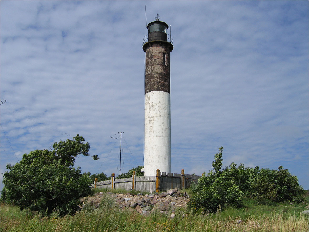 Kübassaare tuletorn